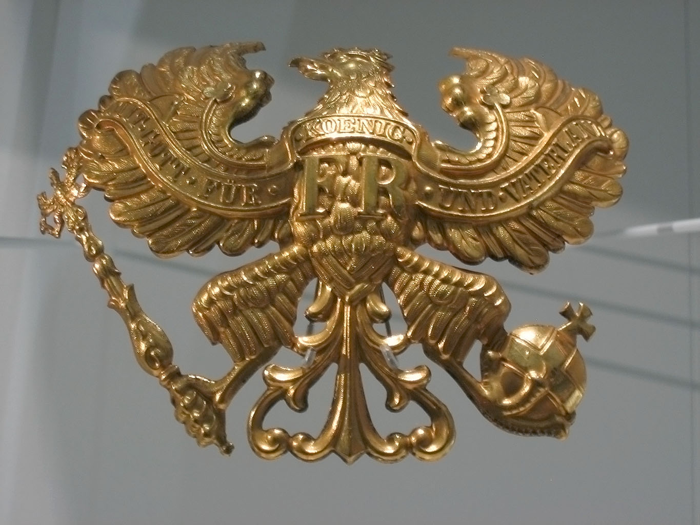 Goldadlerverzierung eines preußischen Pickelhels im Militärhistorischen Museum der Bundeswehr in Dresden